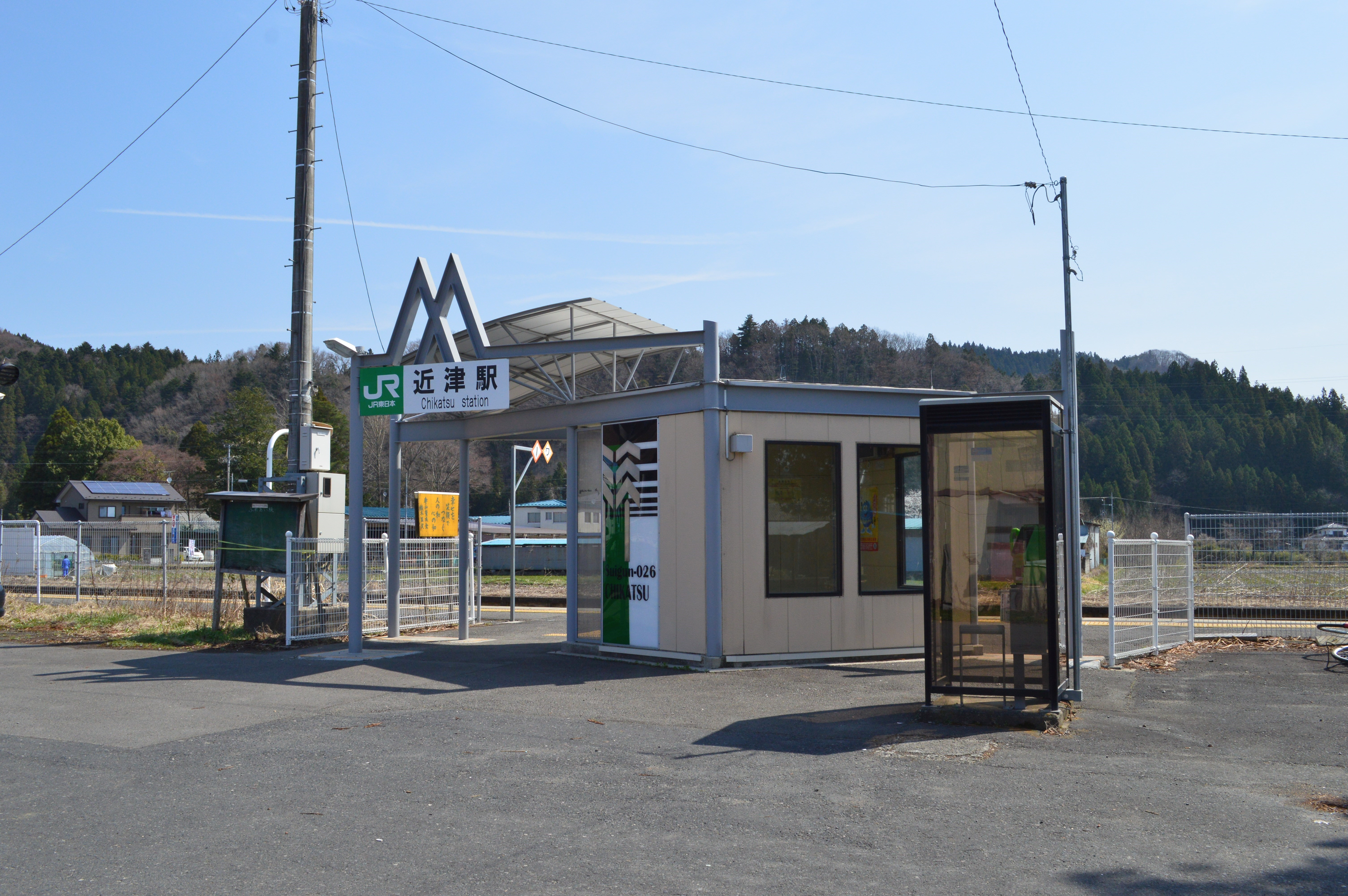 近津駅 駅舎